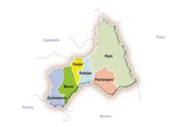 La Provincia de Oyon y sus Distritos